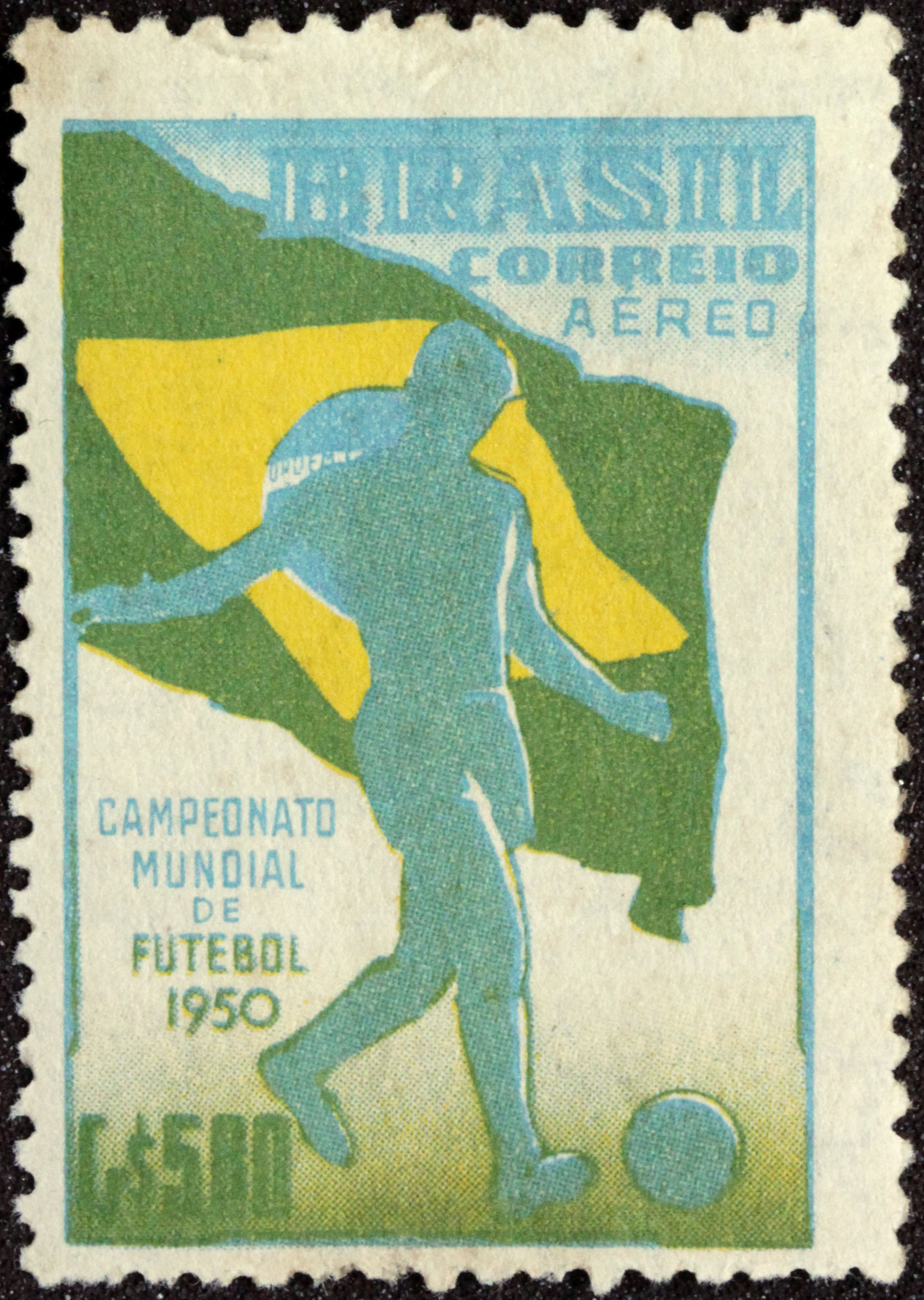 Selo Comemorativo do Campeonato Mundial de Futebol de 1950 (Copa do Mundo de 50).